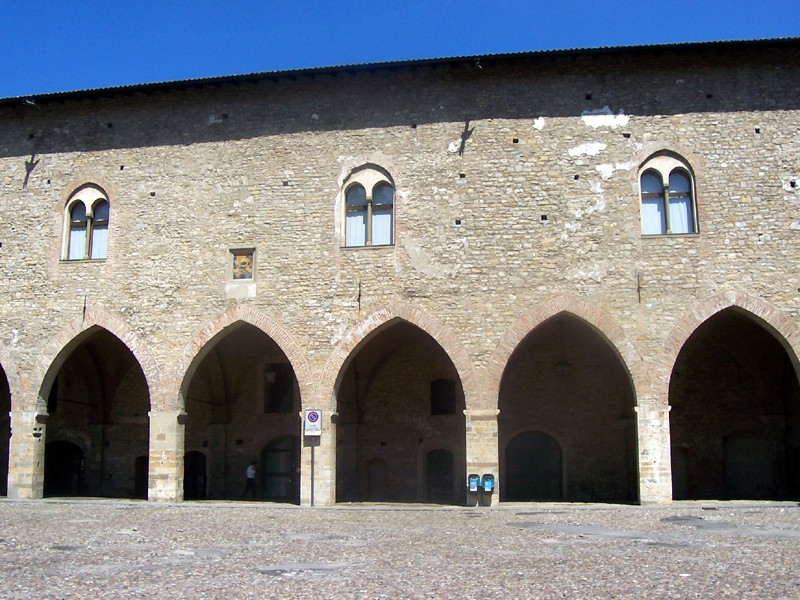 Bergamo - Cortile della Cittadella